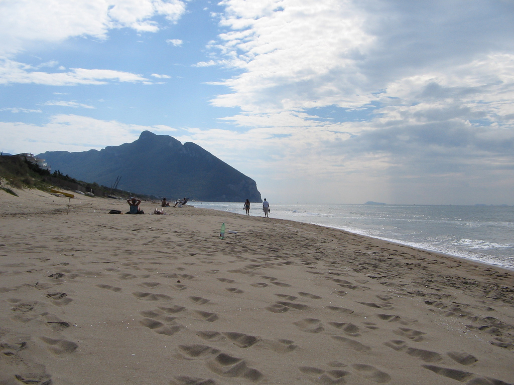 Sabaudia, Lazio, Italia